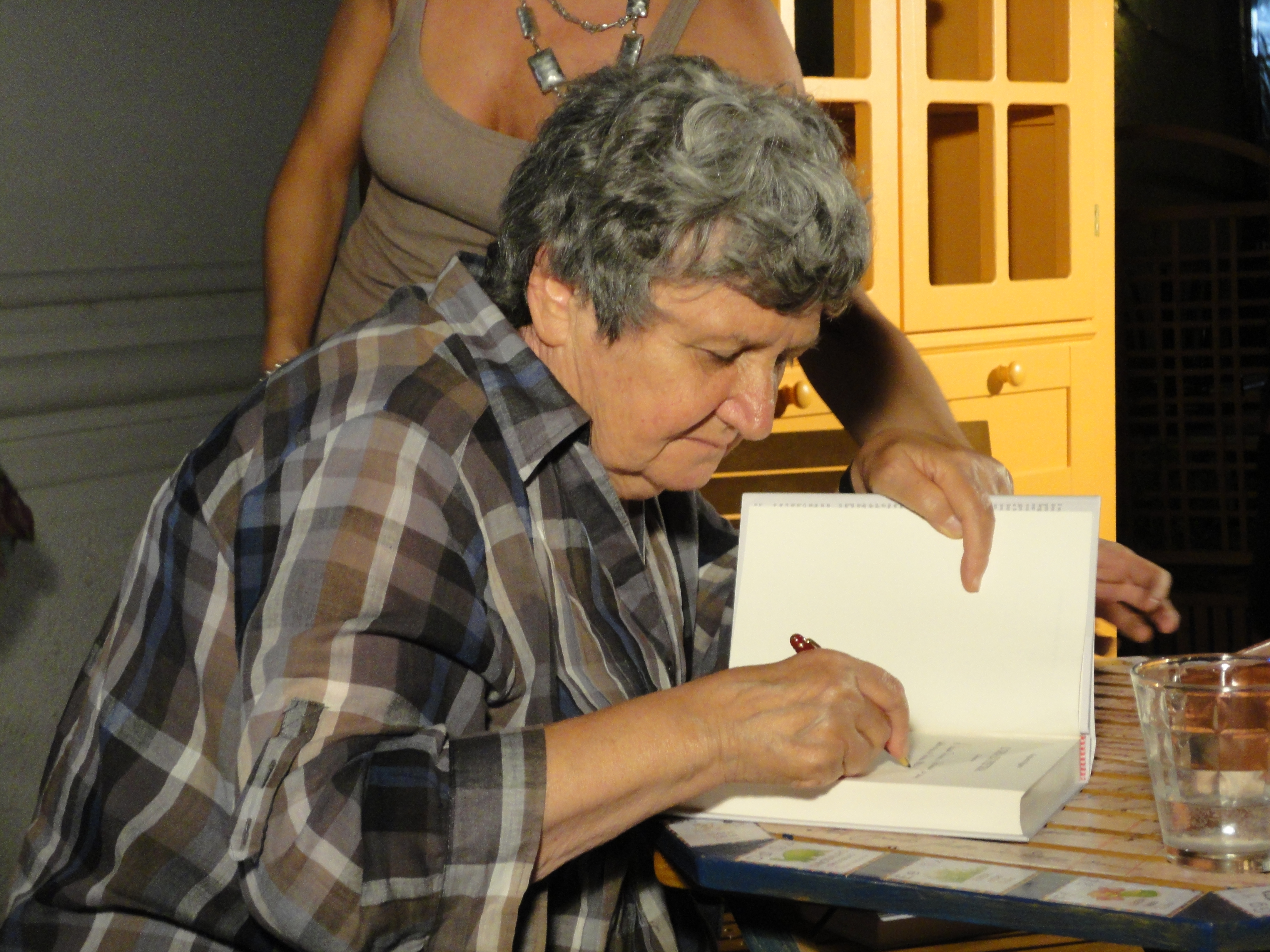 Autore: Tony Frisina - Alessandria